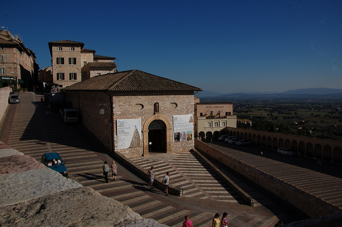 Assisi